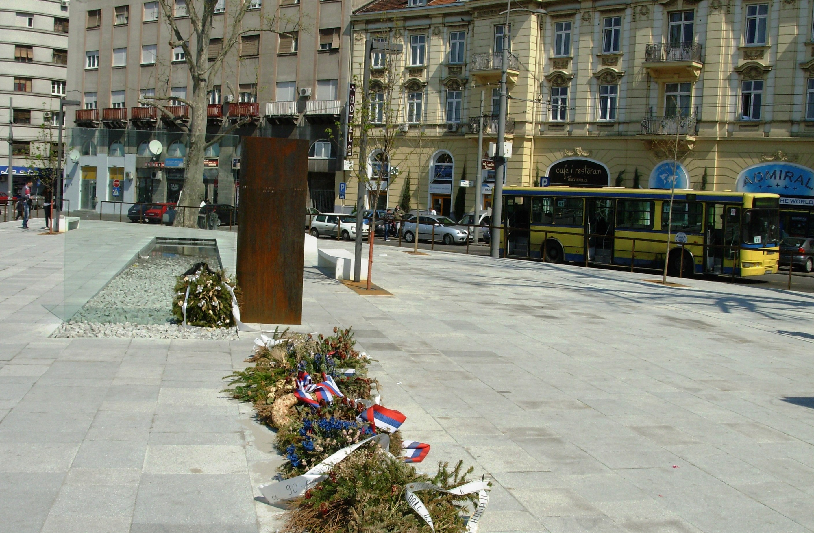 Spomenik žrtvama rata i braniocima 1990 - 1999. Savski trg, Beograd. Slikao Goldfinger